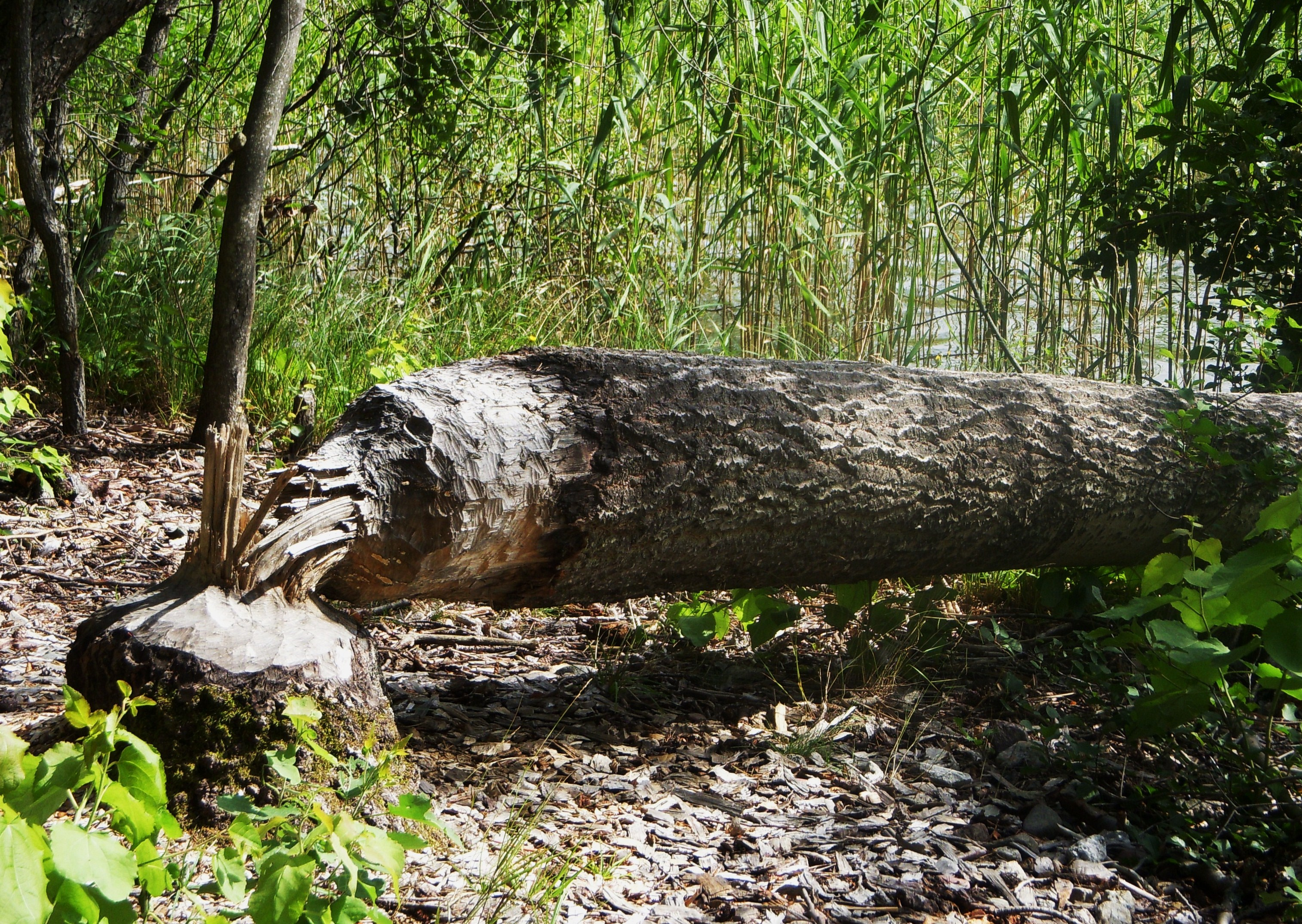 Naturen på "Kärsön" i Ekerö kommun